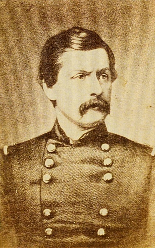 Беларуская (тарашкевіца): Партрэт Людвіка Нарбута (Ludvik Narbut)